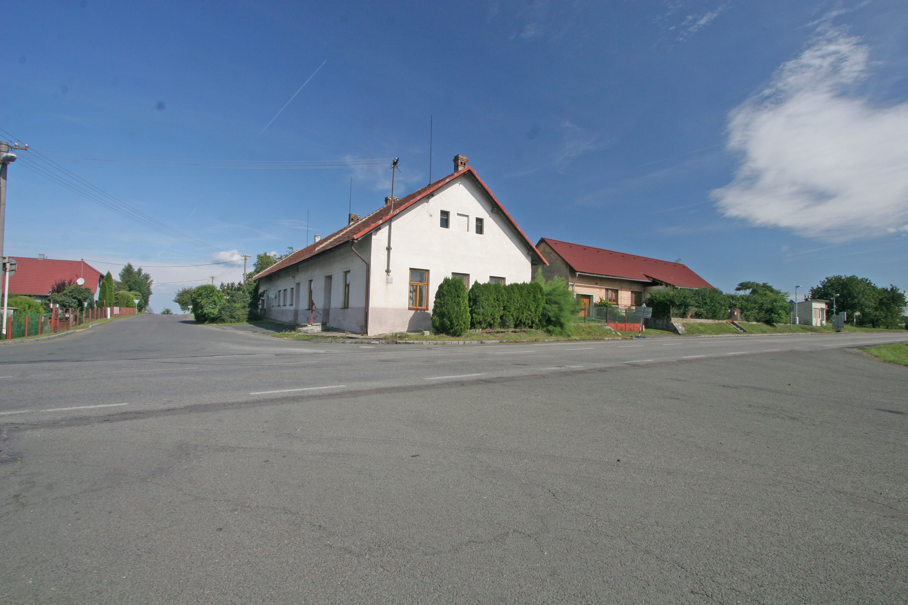 Nový Dvůr čp. 73